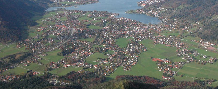 Rottach-Egern aus der Vogelperspektive